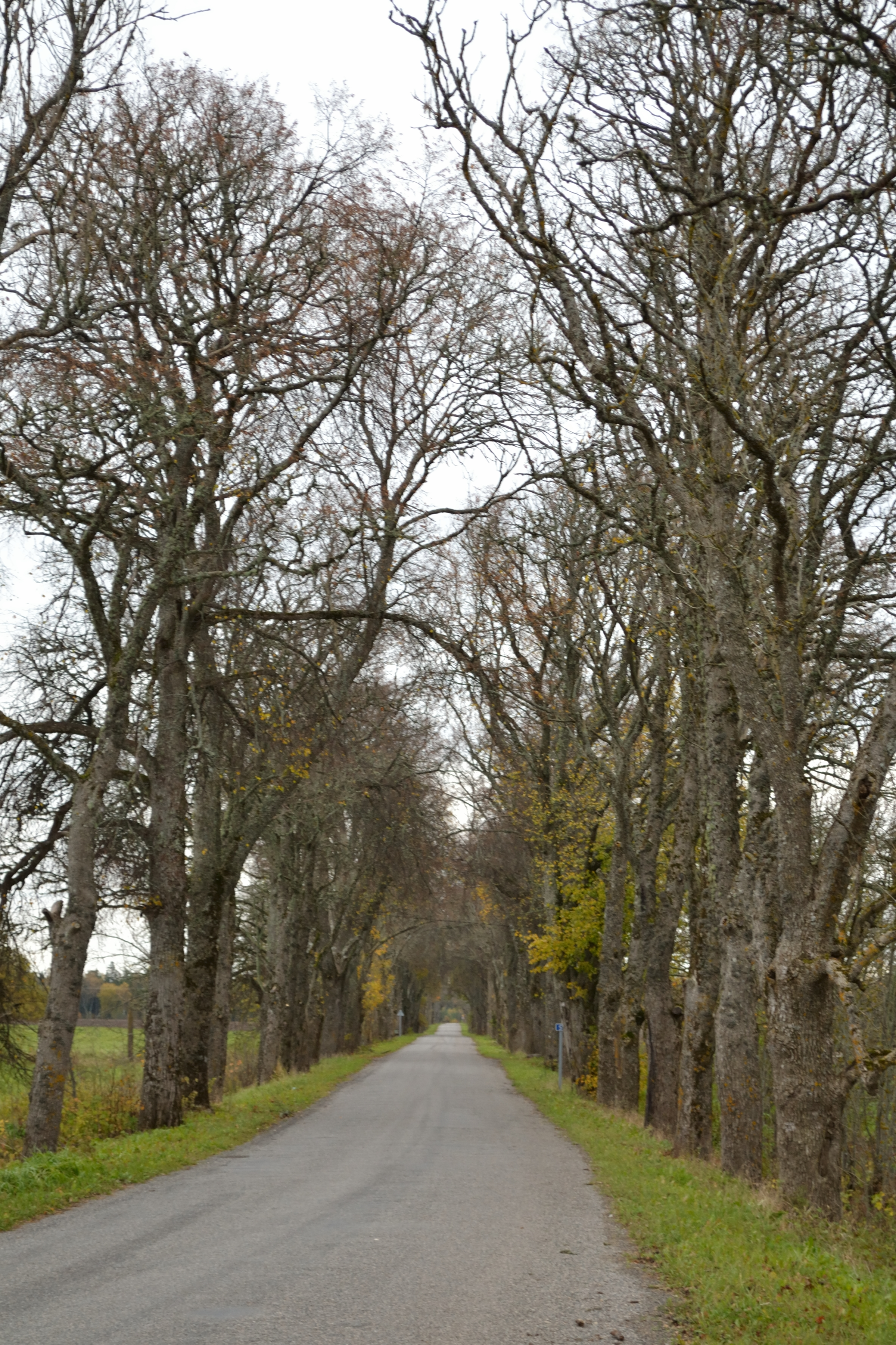 Nurme mõisa allee, 18.-20.sajand